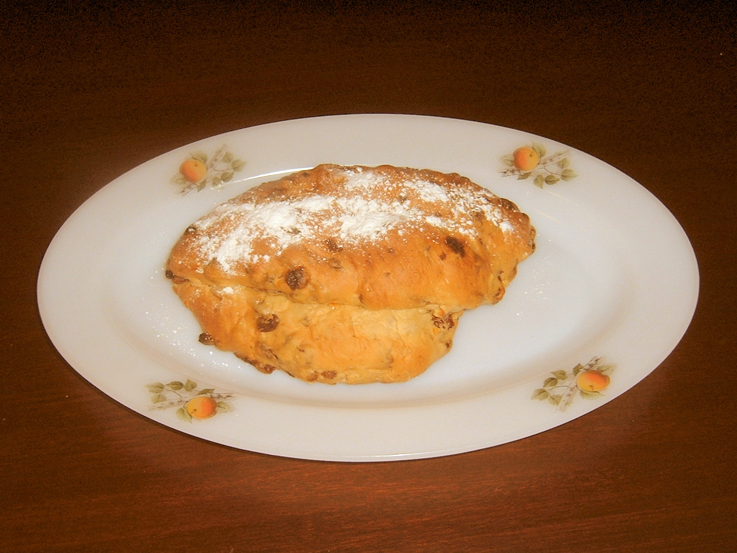 Kerststol - eigen foto